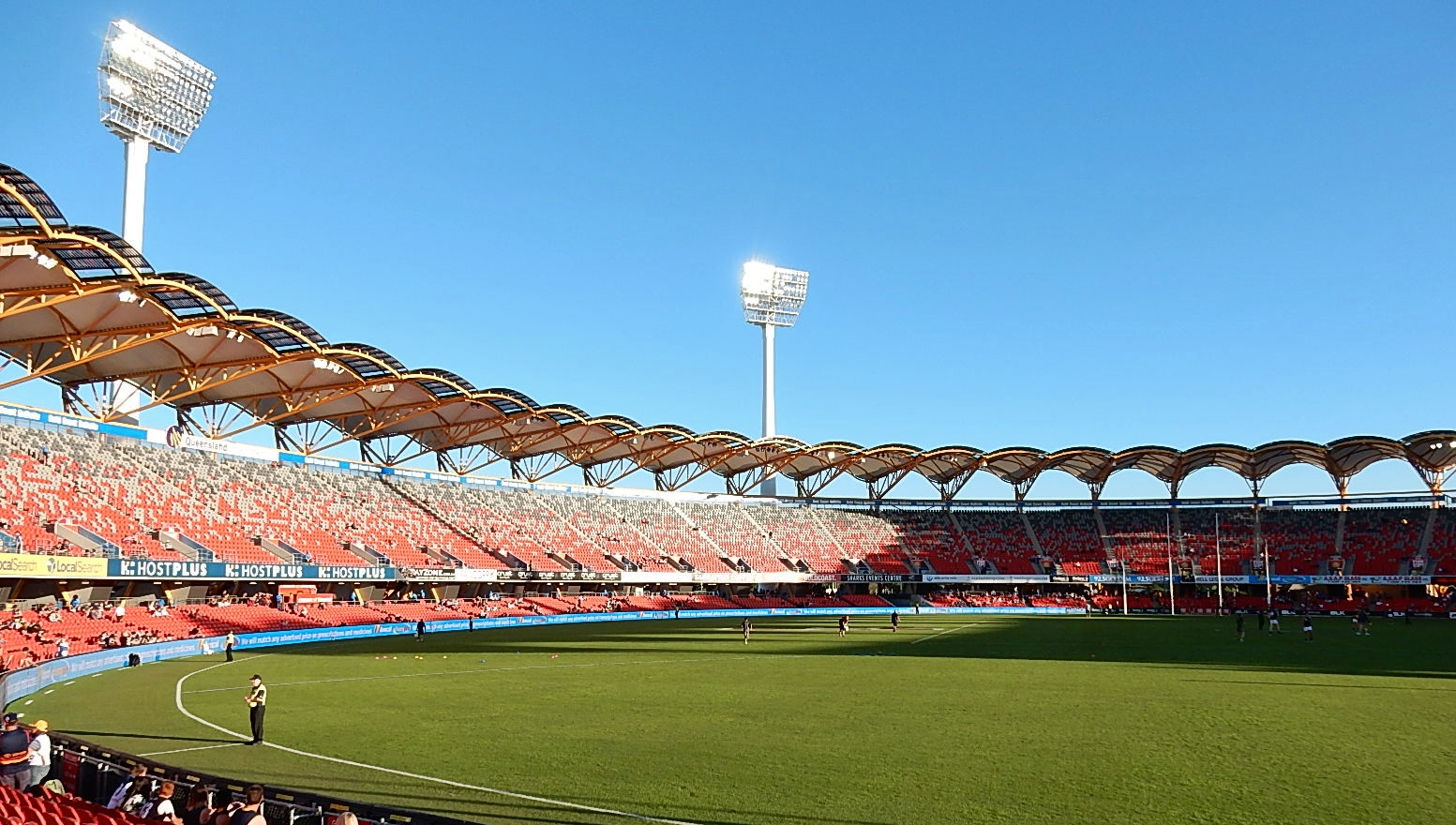 Sunny Stadium